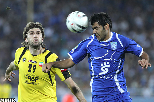 دیدار تیم های فوتبال استقلال و سپاهان اصفهان در ۵ شهریور ۱۳۸۹ با پیروزی چهار بر سه تیم فوتبال استقلال در ورزشگاه آزادی (مشاهده گزارش بازی)